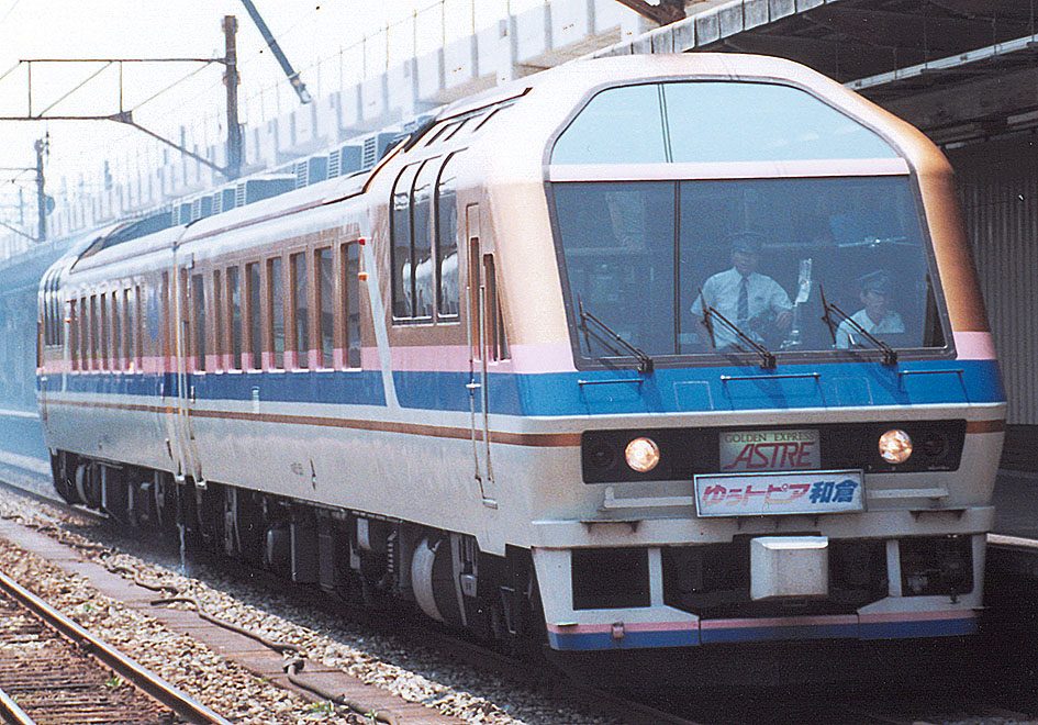 キロ65 アストル ゆぅトピア和倉代走